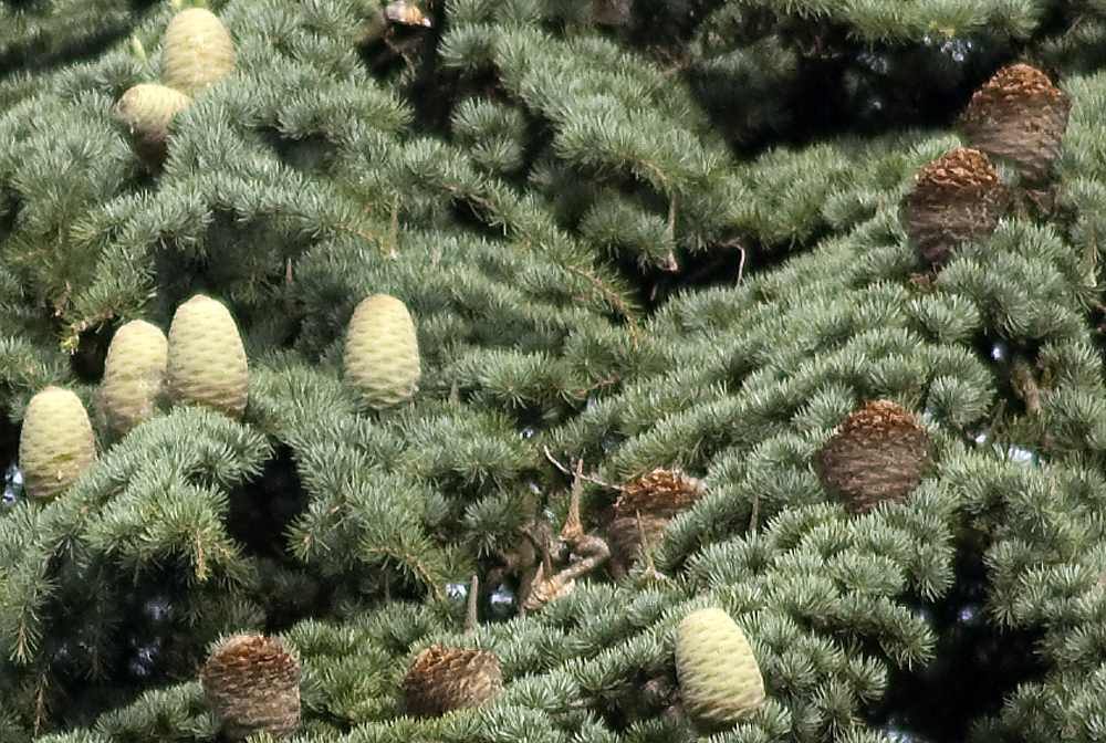 Fast reife und zerfallende Zapfen von Cedrus libani var. atlantica, Schlosspark Weinheim syn: Cedrus atlantica’'.